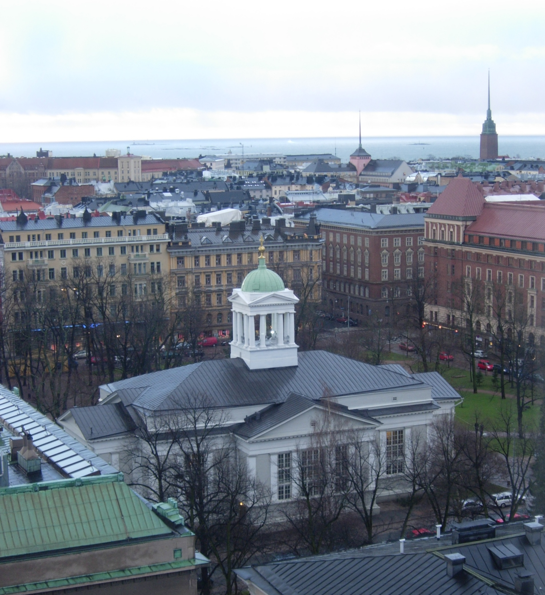 Helsingin Vanhakirkko ja Etelä-Helsinki. Kuvattu Tornista.